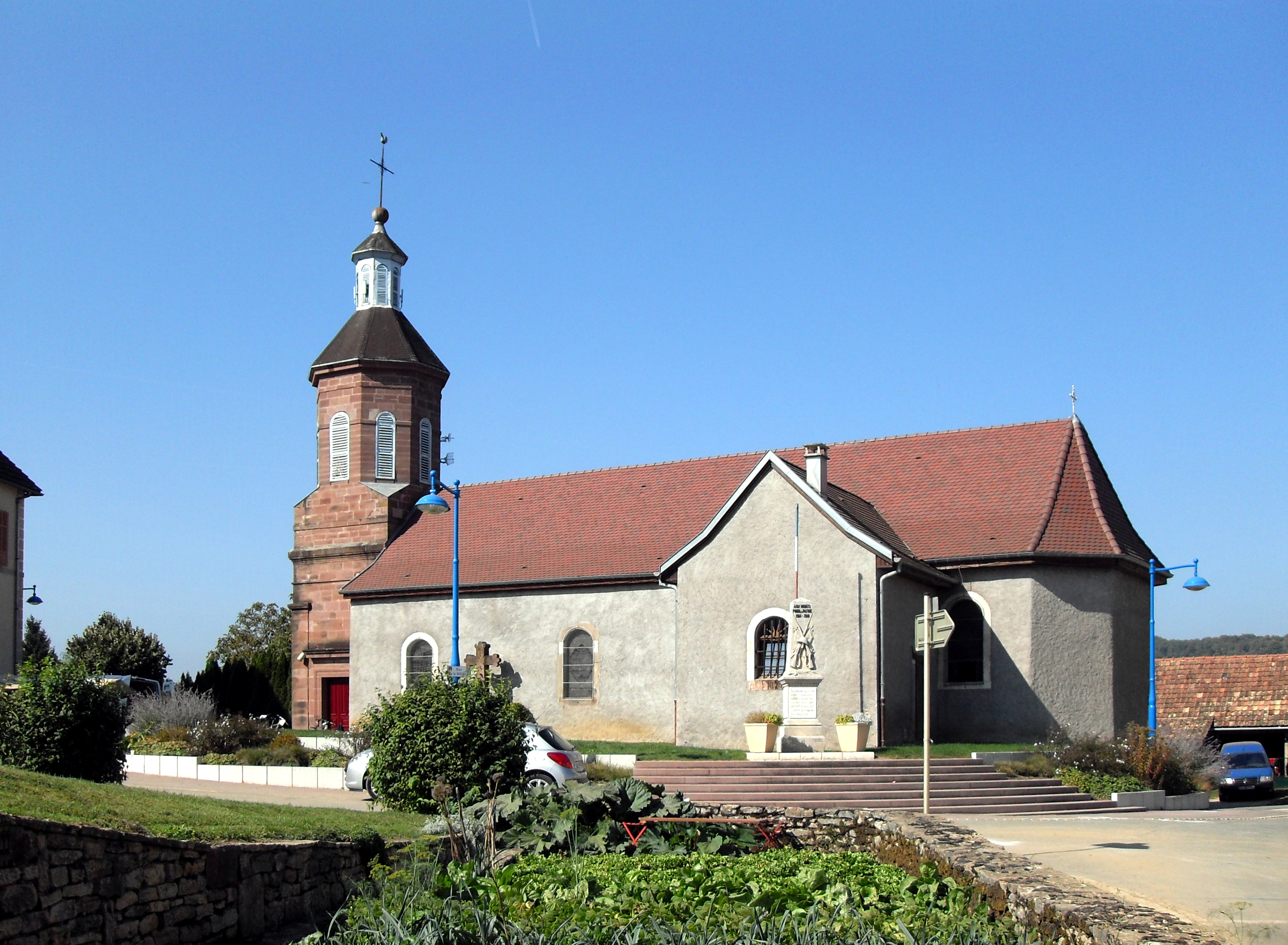 L'église Saint-Ambroise à Banvillars